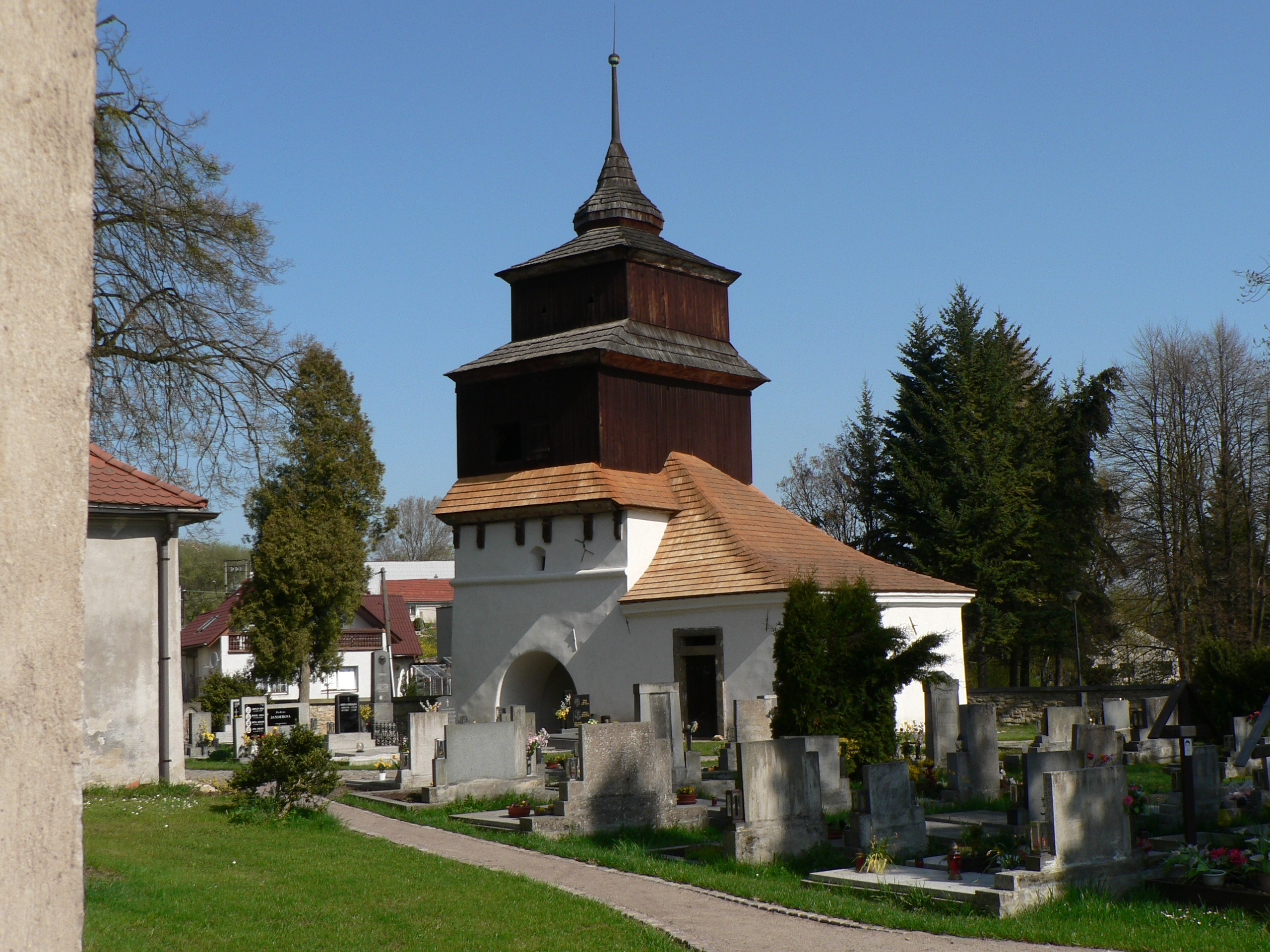 Zvonice u kostela sv. Bartoloměje, Semanín